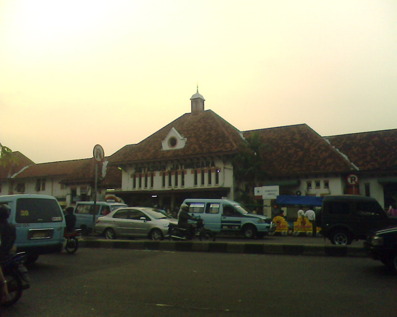 Jatinegara Station, Jakarta